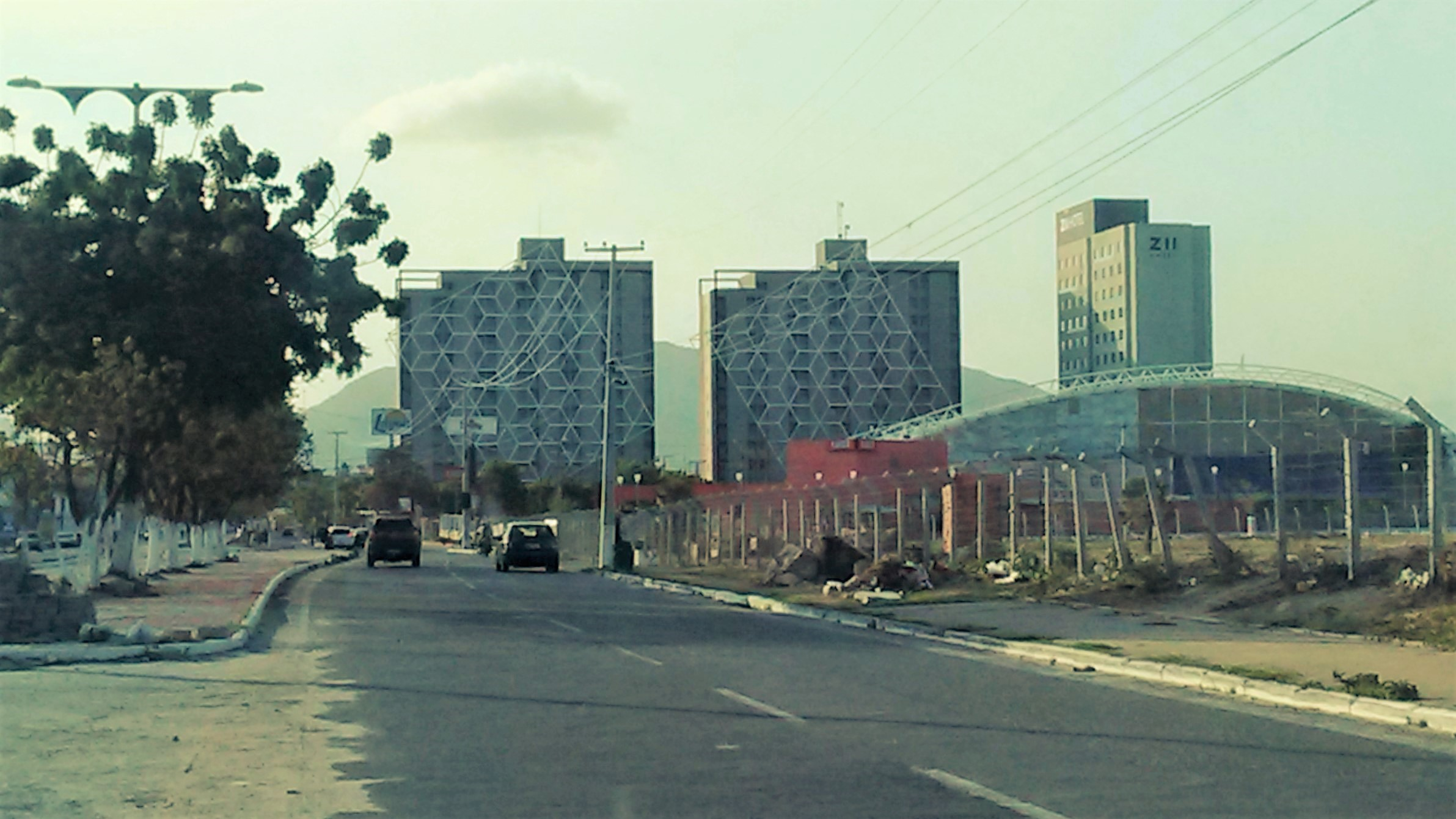 Torres comerciais em Maracanaú, Ceará, Brasil.